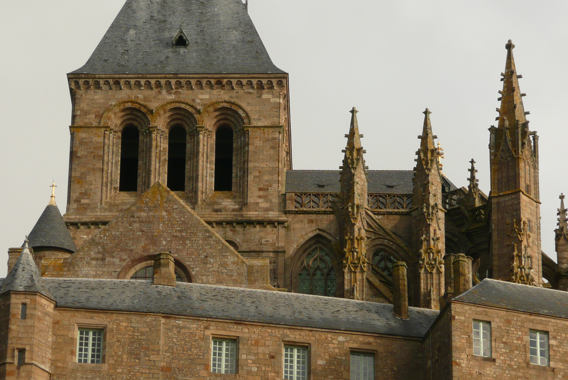 Mont Saint-Michel